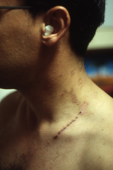 golfeur foudroyé au cours du jeu: rupture du tympan et brûlures de la peau du cou avec empreinte des maillons de chaîne fondue